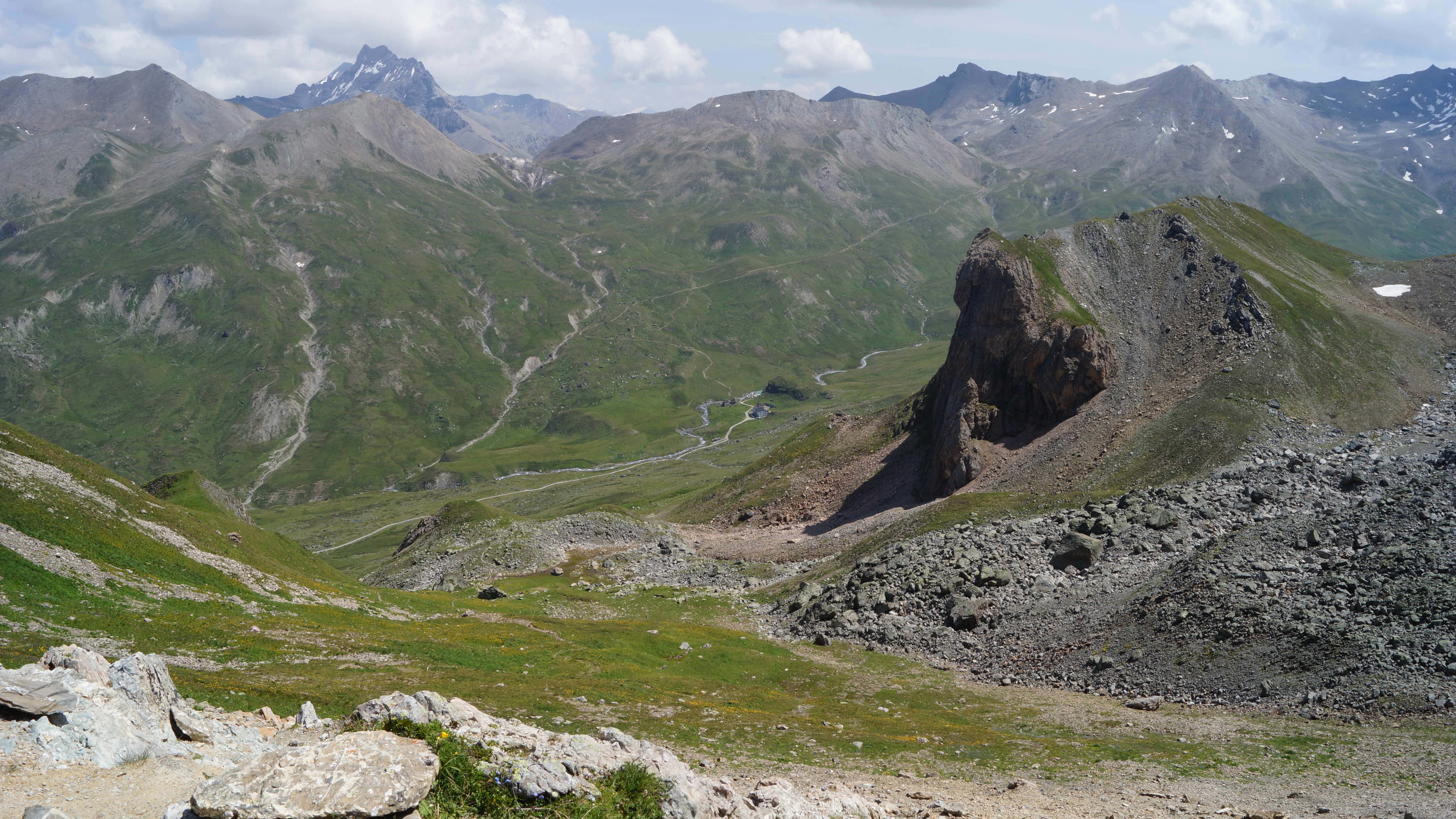 Vom Ritzenjoch 2.688 m blicken wir hinunter zur Heidelberger Hütte (Mitte) und in die Samnaungruppe.